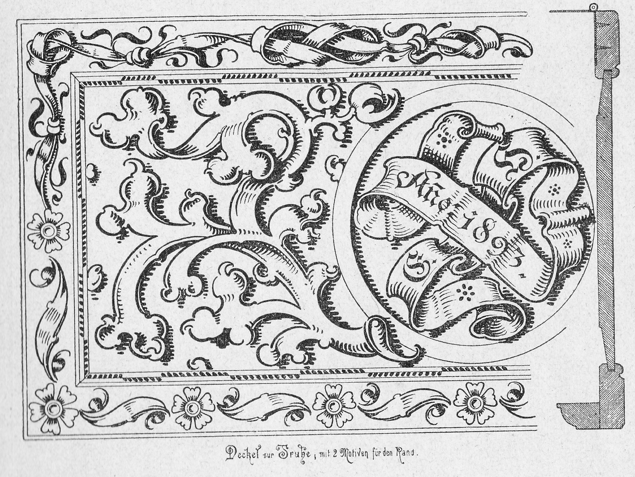 Vorlage für Brandmalerei auf Möbeln, Entw. von Prof. Josef Tapper, dat. 1893